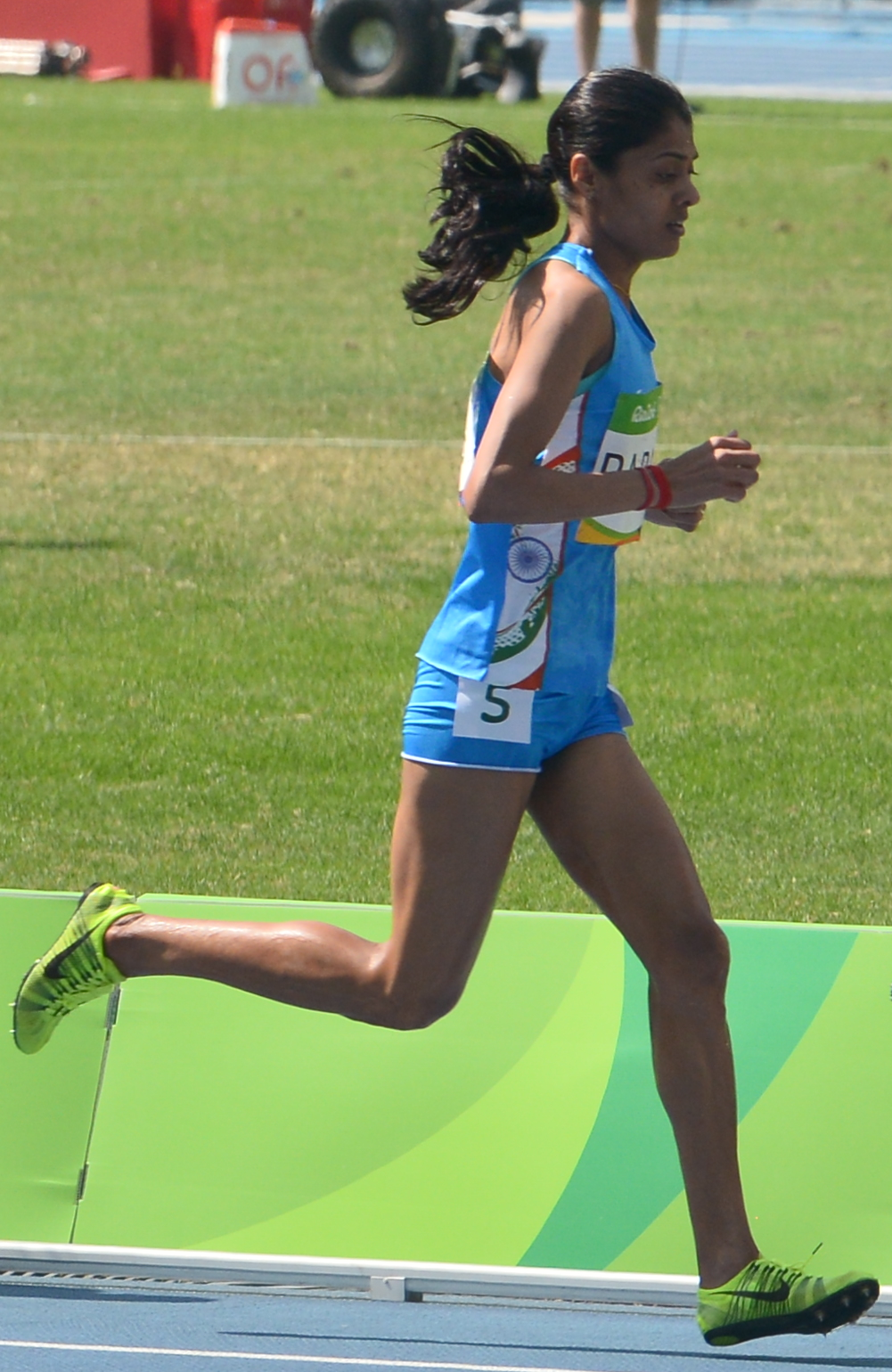 Finale du 3000m steeple des jo de Rio 2016